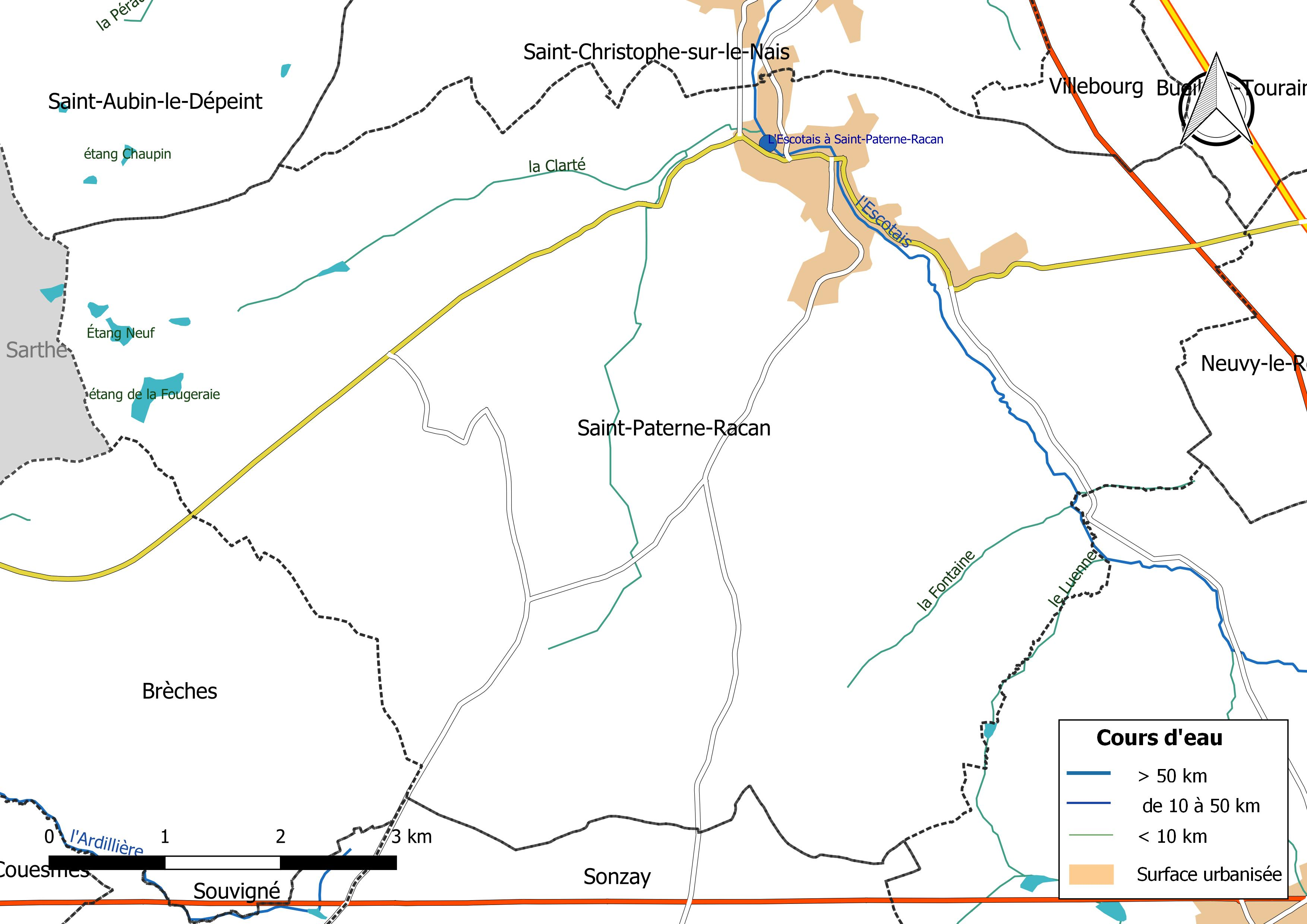 Carte du réseau hydrographique de la commune de Saint-Paterne-Racan (France).